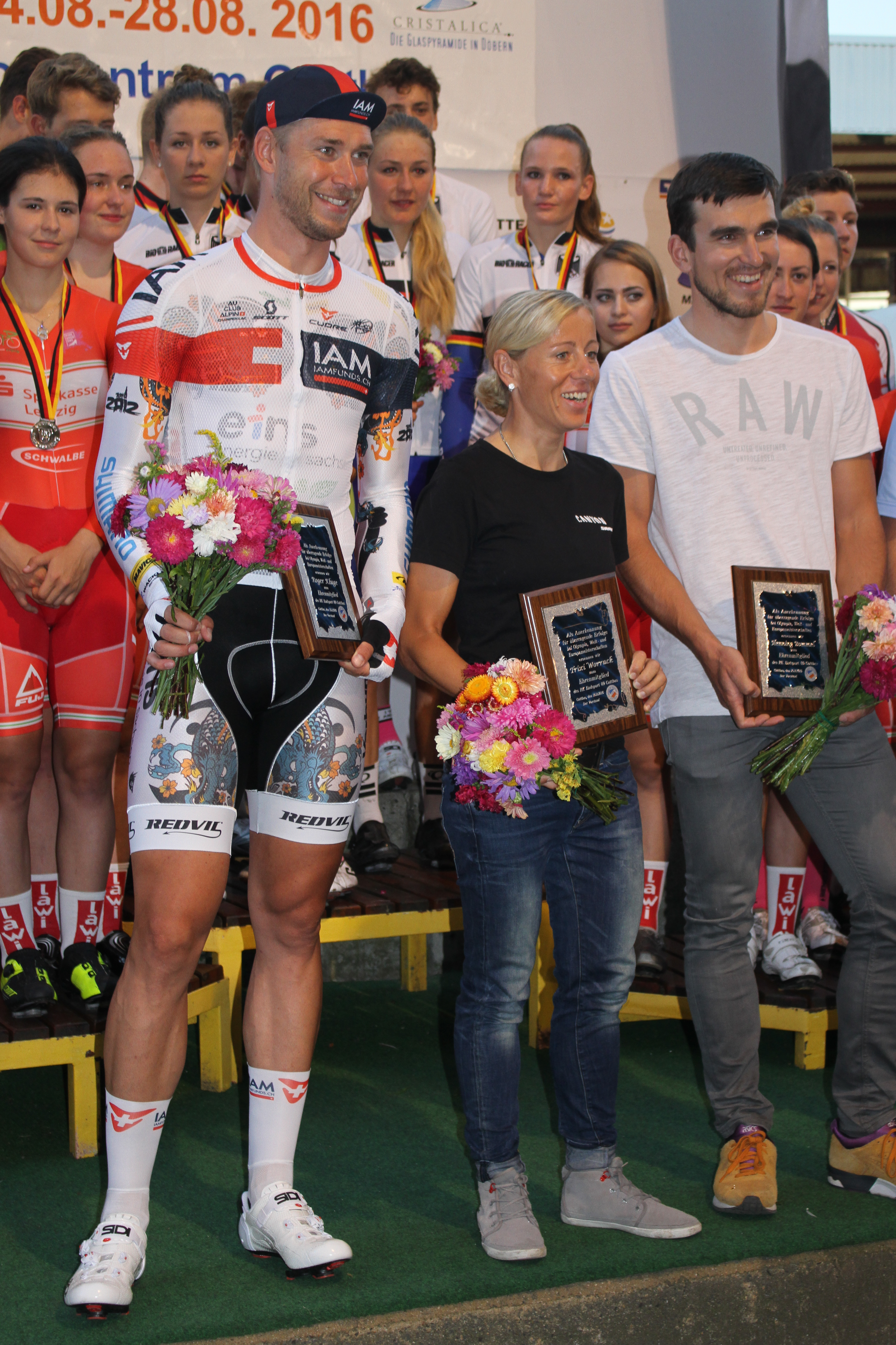 Ehrung von Roger Kluge, Trixi Worrack und Henning Bommel (v.l.n.r.) als Ehrenmitglieder des RK Entspurt Cottbus